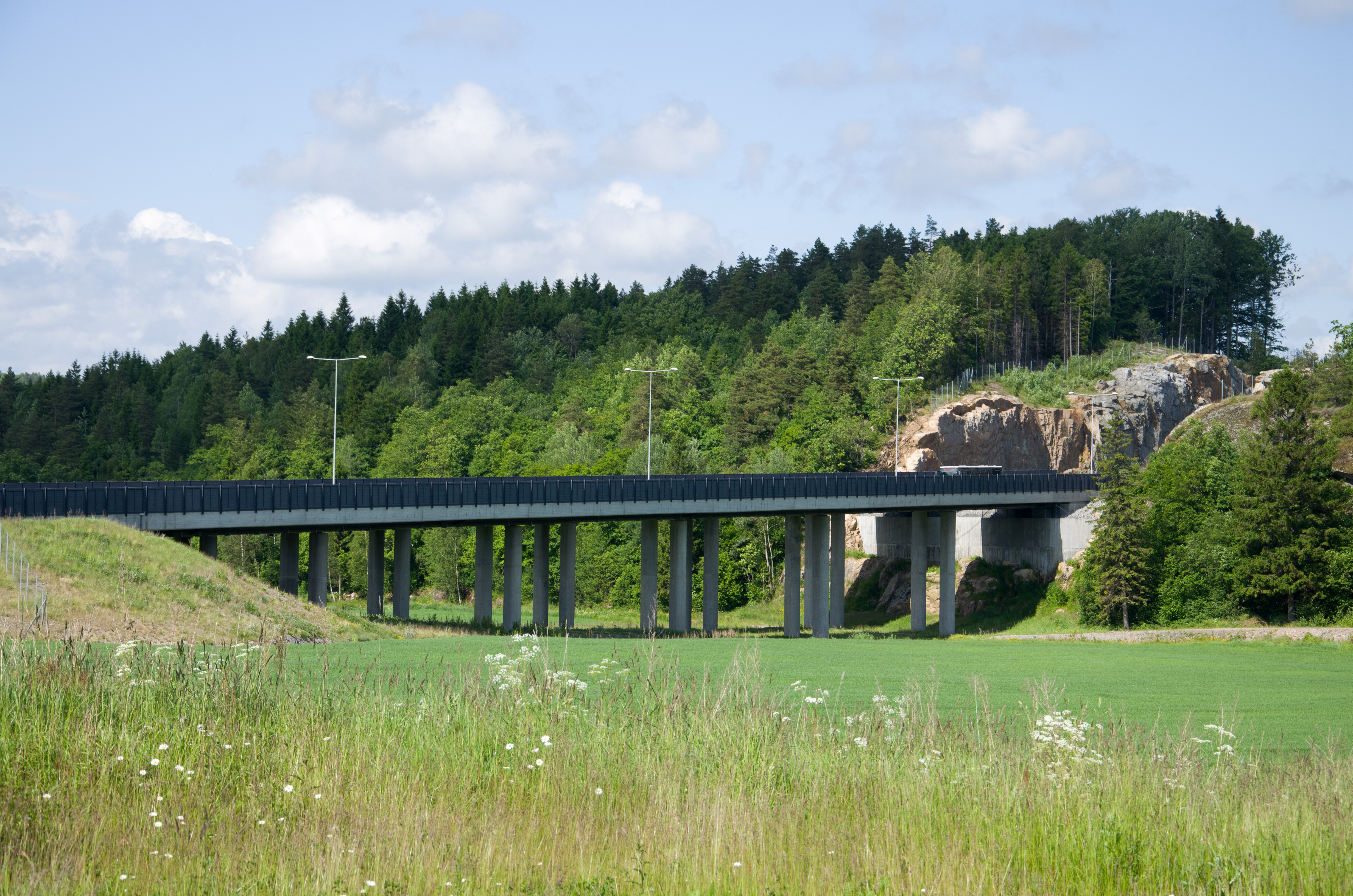 Rødbølbrua på E18 mellom Sandefjord og Larvik